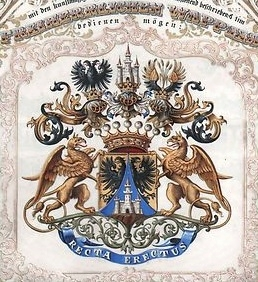 Wappen aus dem Adelsdiplom für den Mathematiker, Technologen und Universitätsprofessor Adam von Burg (1797-1882), das diesem 1866 von Franz Joseph I. (Kaiser von Österreich 1848-1916) aus Anlass seiner Erhebung in den österreichischen Freiherrenstand ausgestellt wurde.